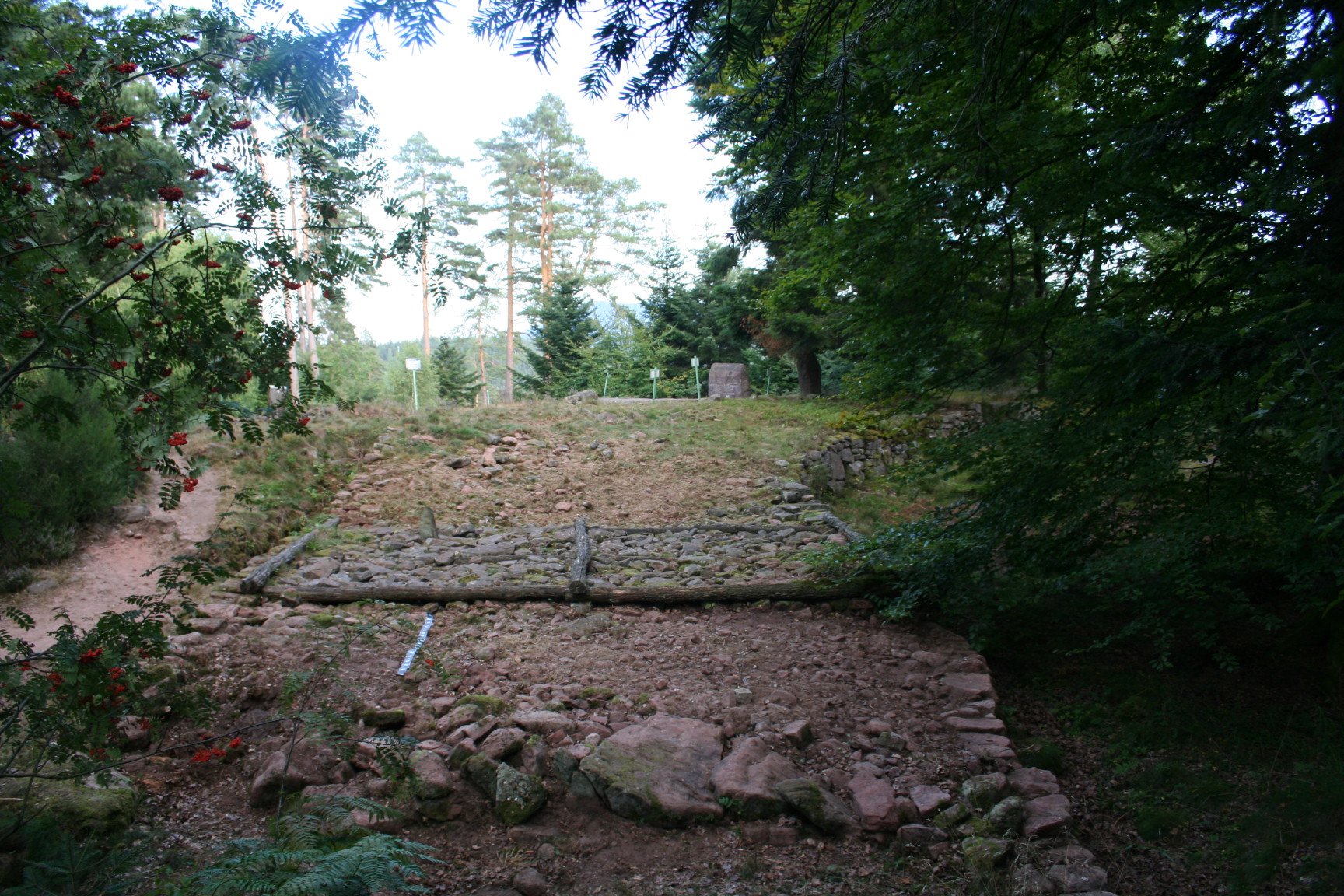 Site de hauteur fortifié de la Bure (Vosges, France) : rempart_de_la_période_gauloise_de_type_Ehrang.